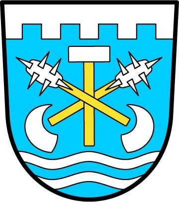 Kolomuty znak